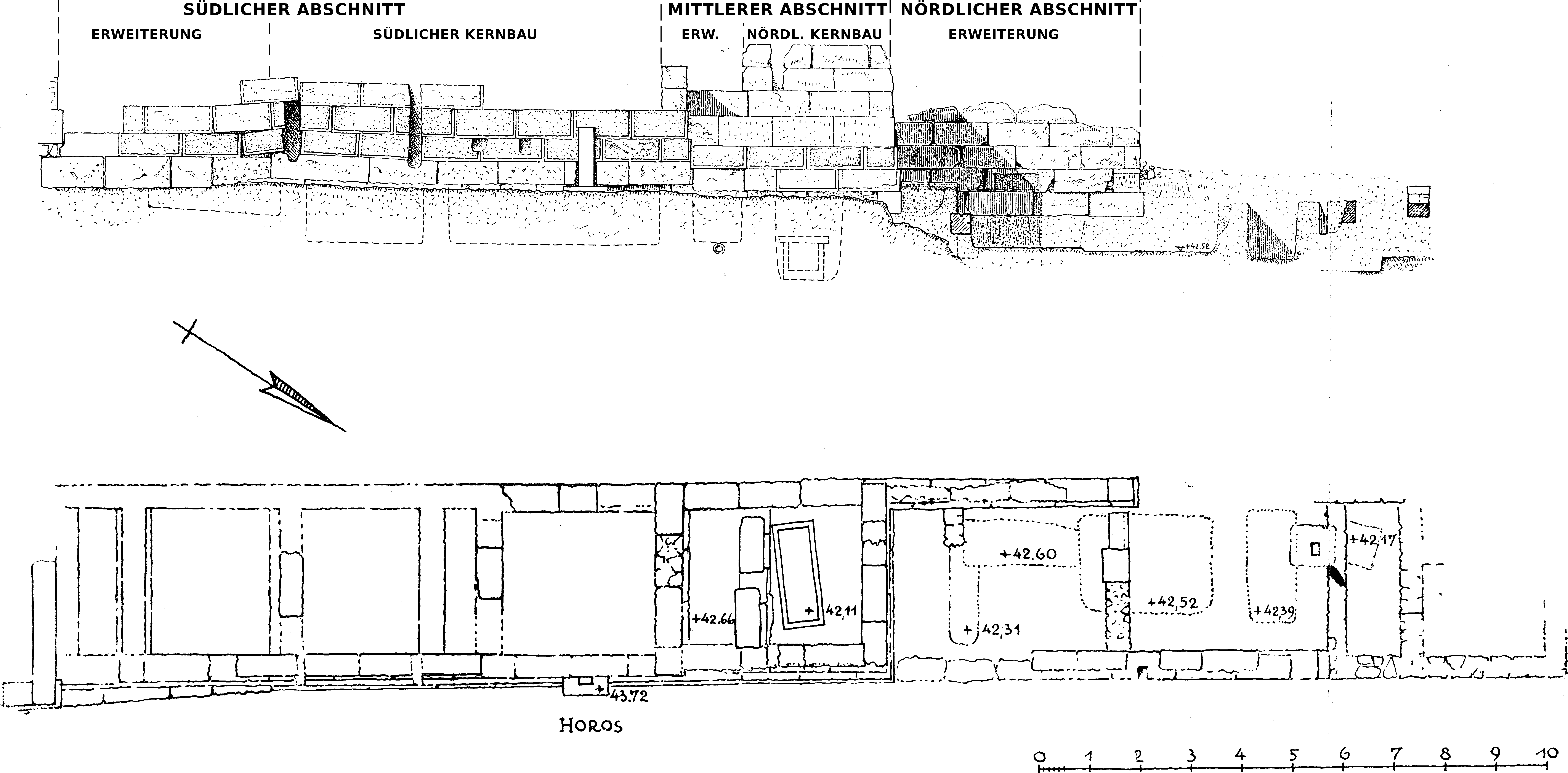 Steinplan und gezeichnete Frontalansicht des Lakedaimoniergrabs auf dem Kerameikos